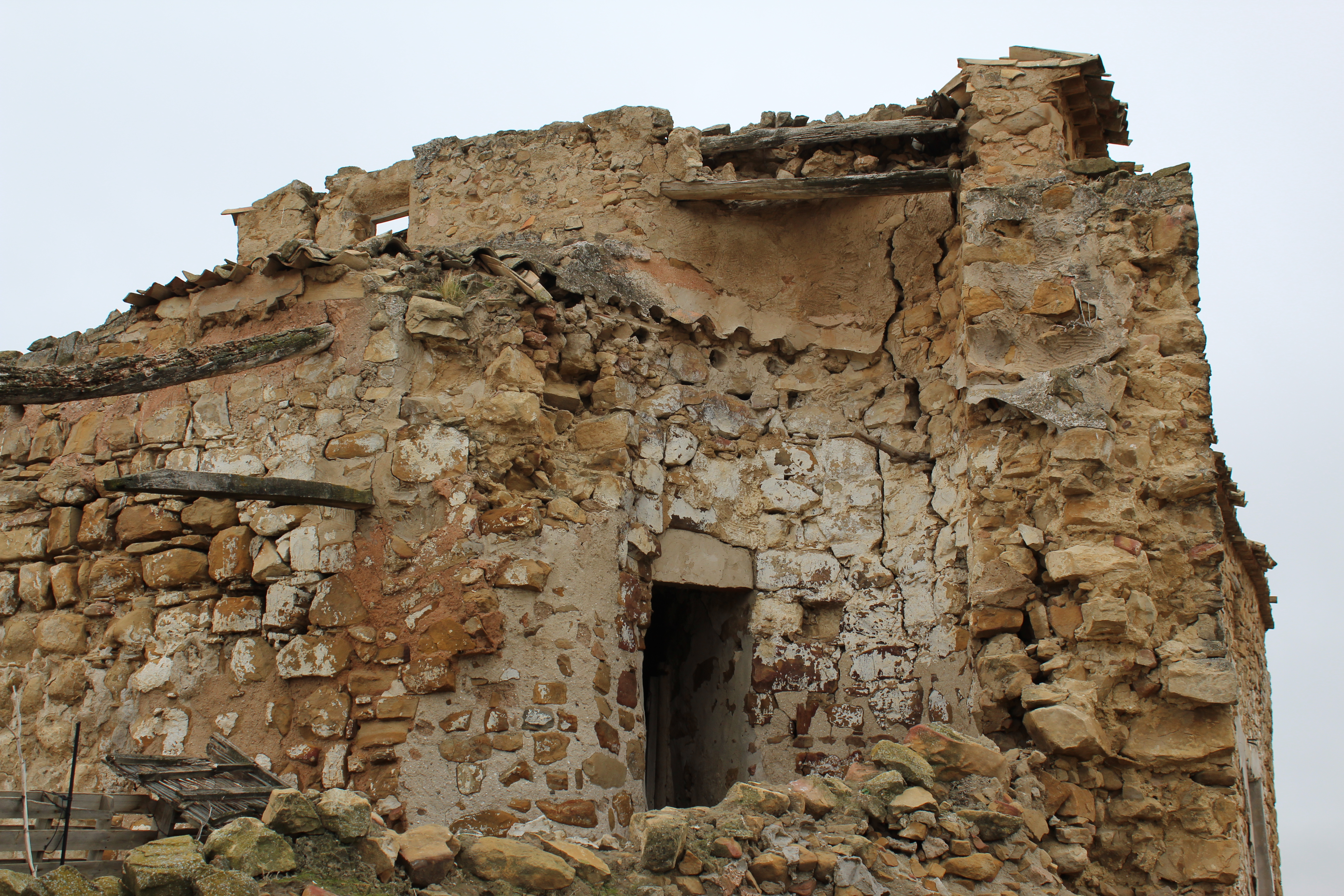 Esquina norte, donde existía un torreón del castillo.